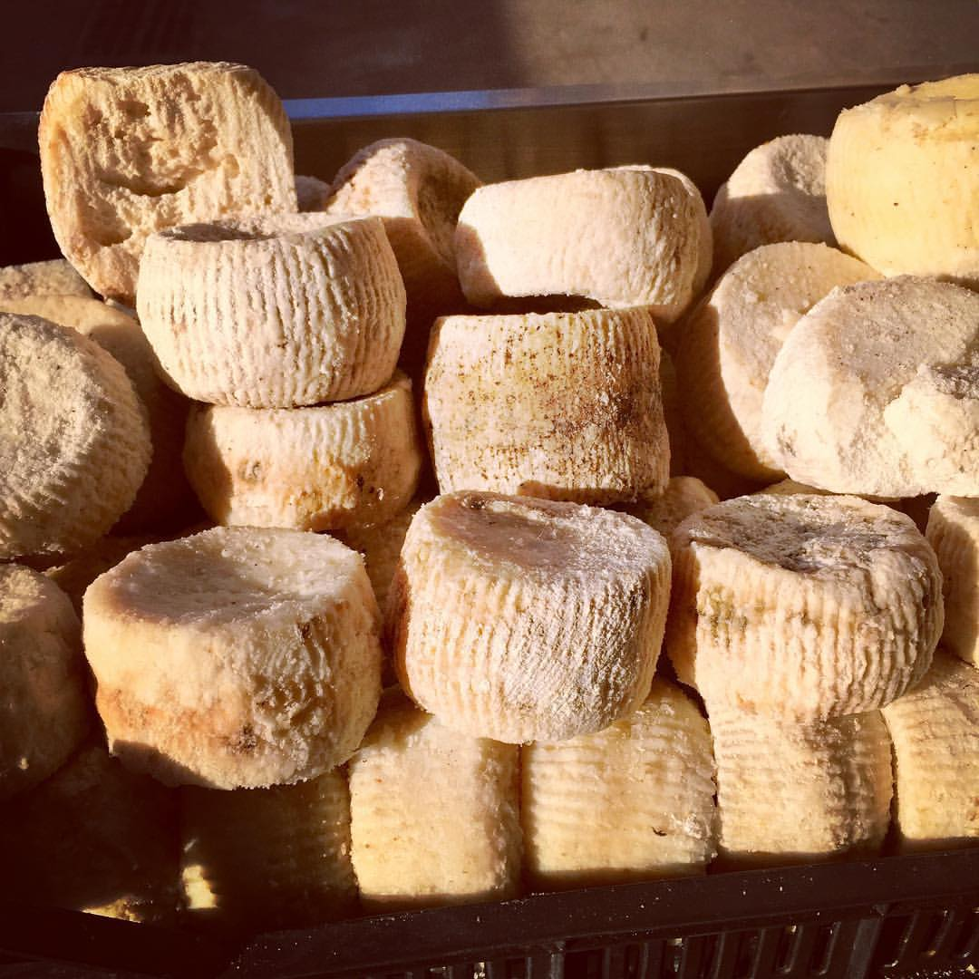 Ricotta salata al mercato di Siracusa